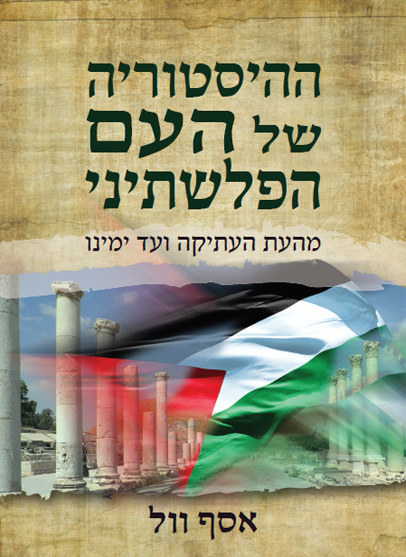 העטיפה של ההיסטוריה של העם הפלשתיני של אסף וול